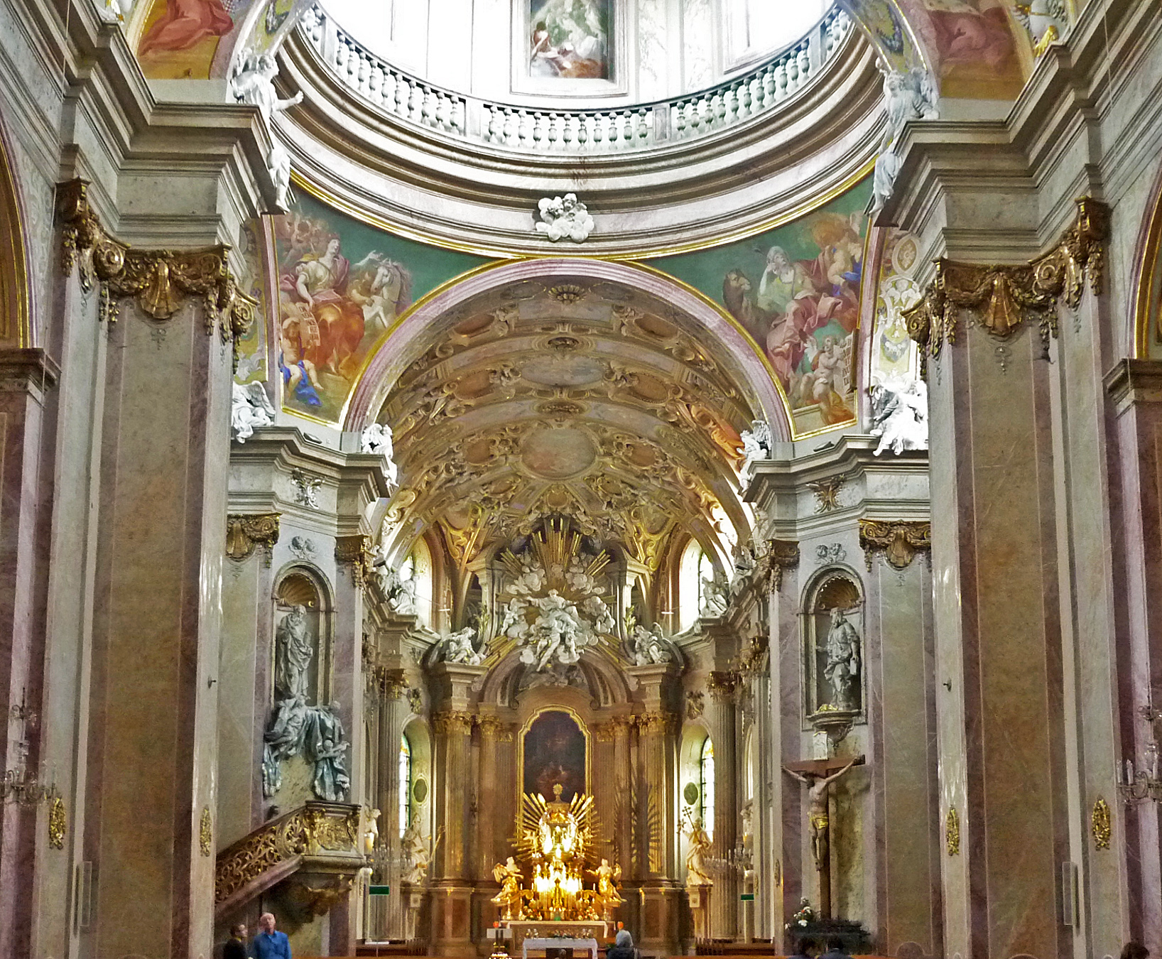 Wallfahrtskirche Mariä Heimsuchung auf dem Heiligenberg (Svatý Kopeček) bei Olmütz in Mähren